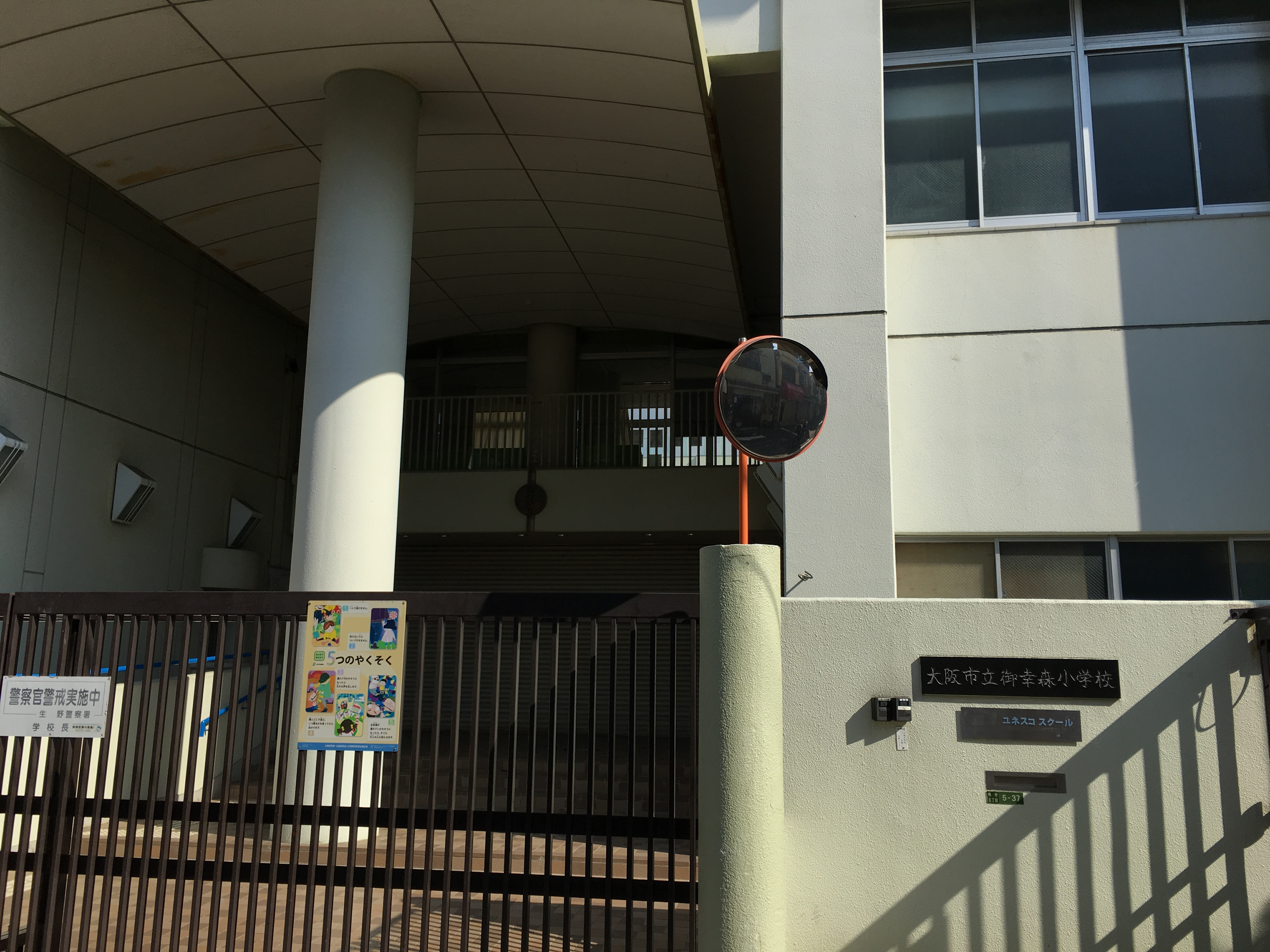 御幸森小学校